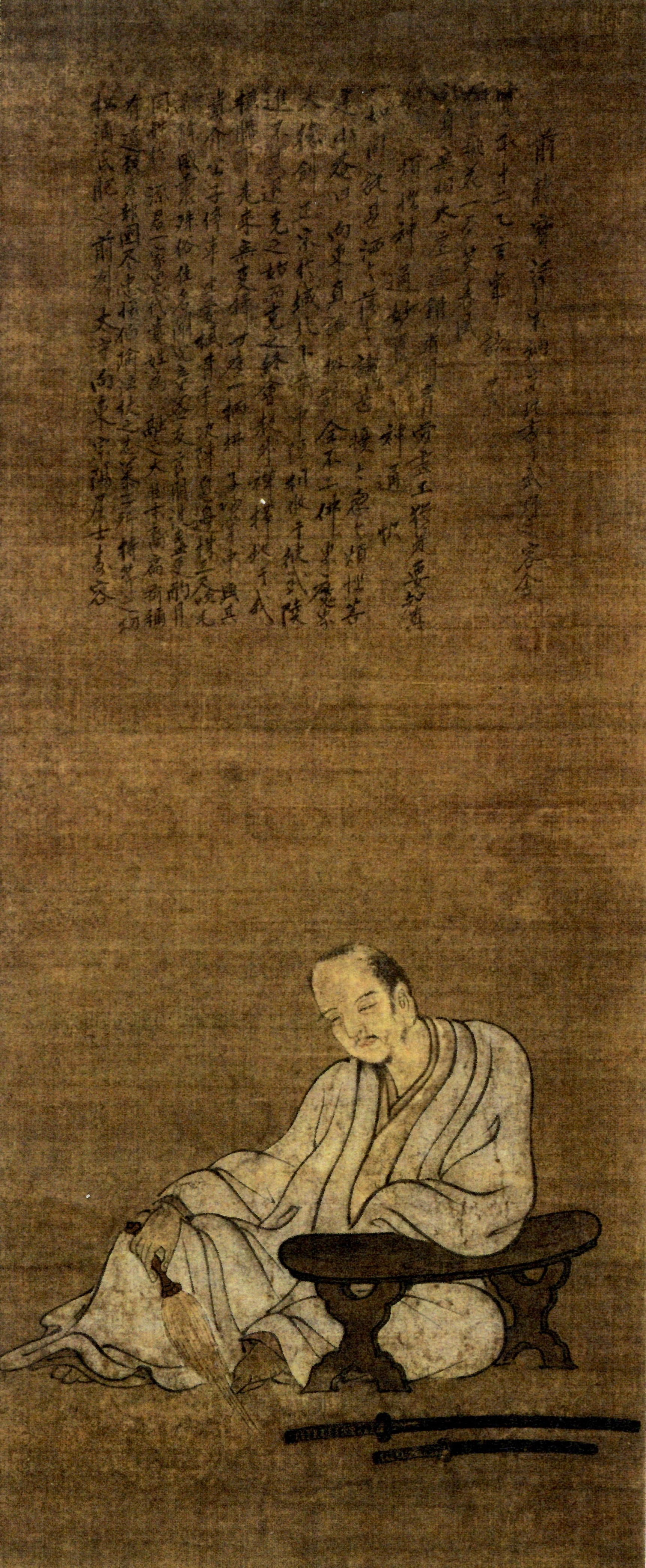 平戸藩主松浦隆信の肖像。